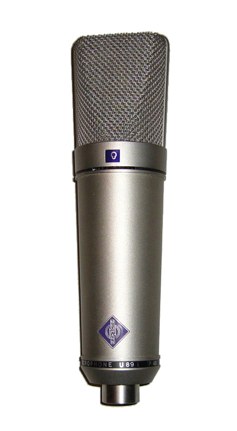 Microphone à condensateur Neuman U89i